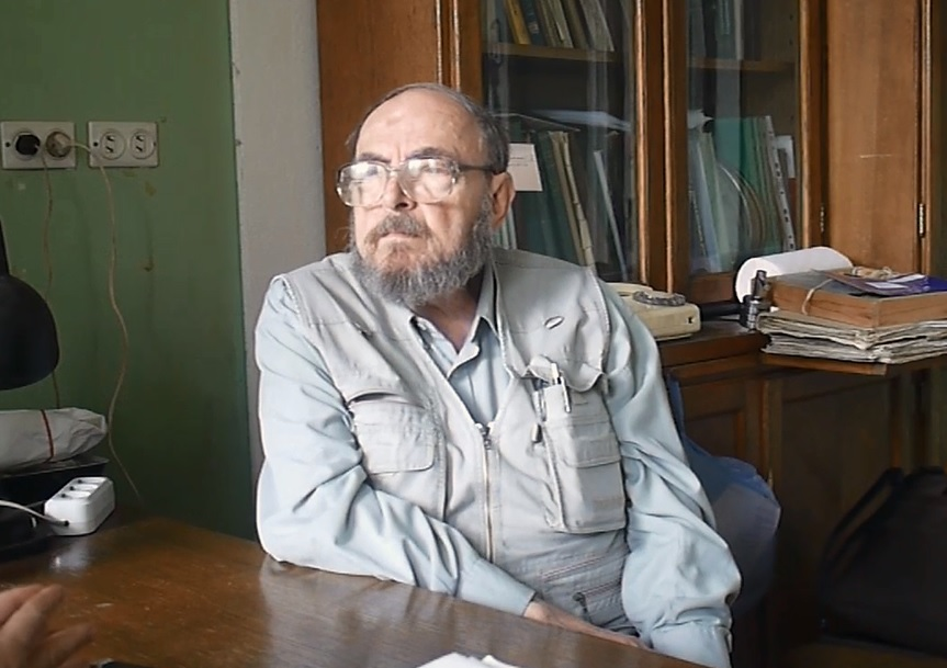 Фото Ф. Я. Дзержинского.